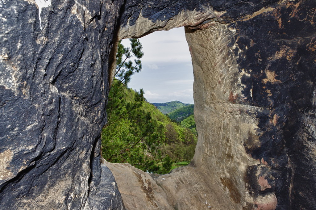 Vedere de la fereastra pesterii lui Dionisie, loc. Nucu, Jud. Buzau